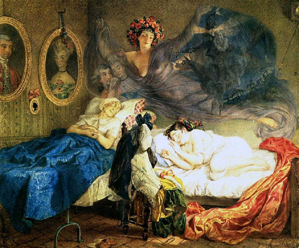 Картина Брюллова "Сон бабусі і внучки"